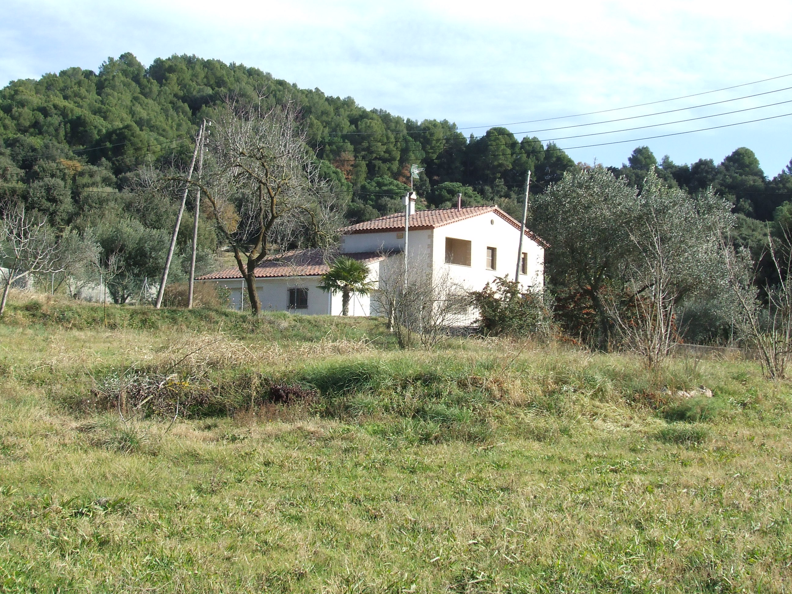 Can Mas de Baix (Bigues, Bigues i Riells, Vallès Oriental)